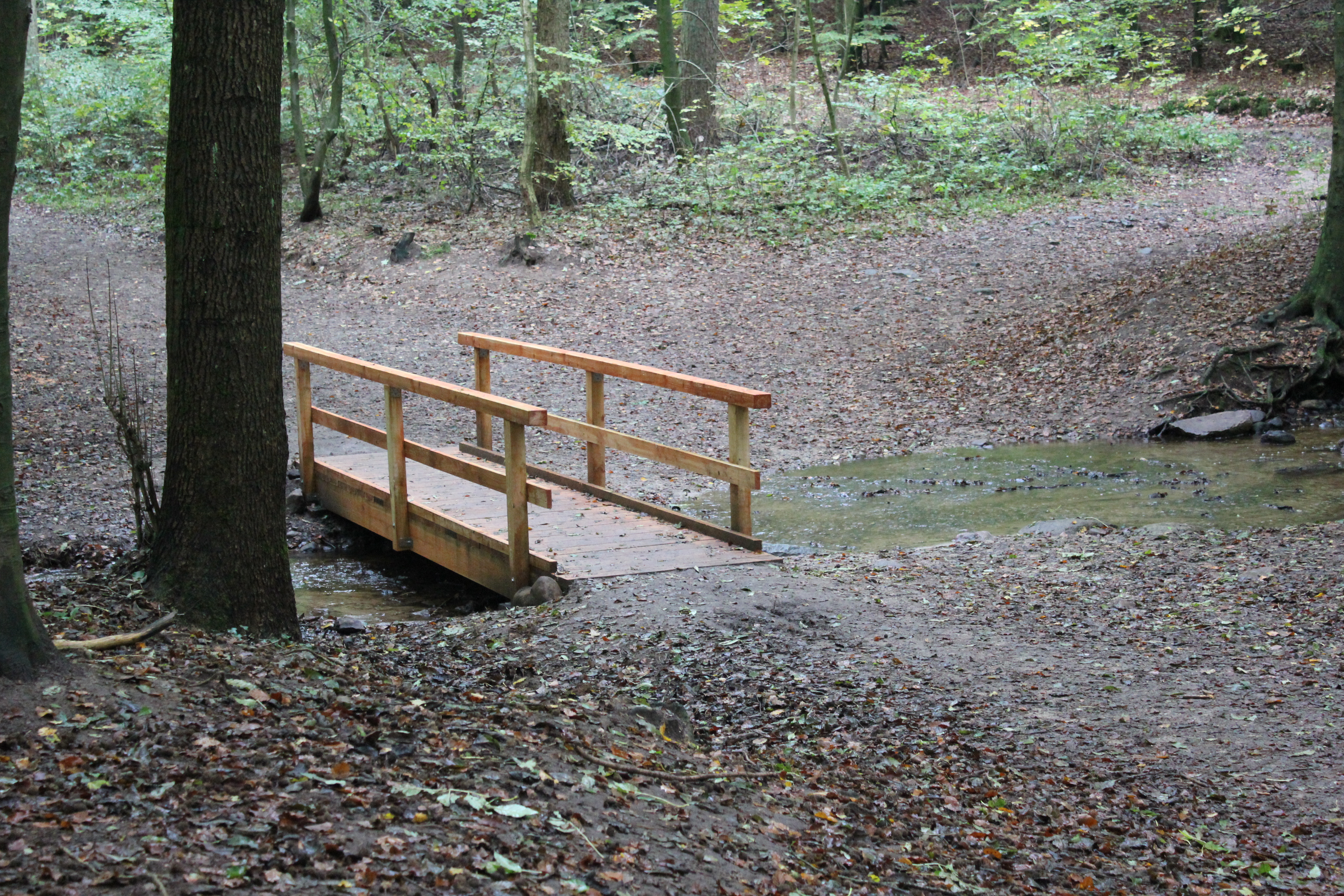 Fördewald oder Tremmeruper Wald, Flensburg, Neue Brücke über Wasserlauf; Furt der Weesbek